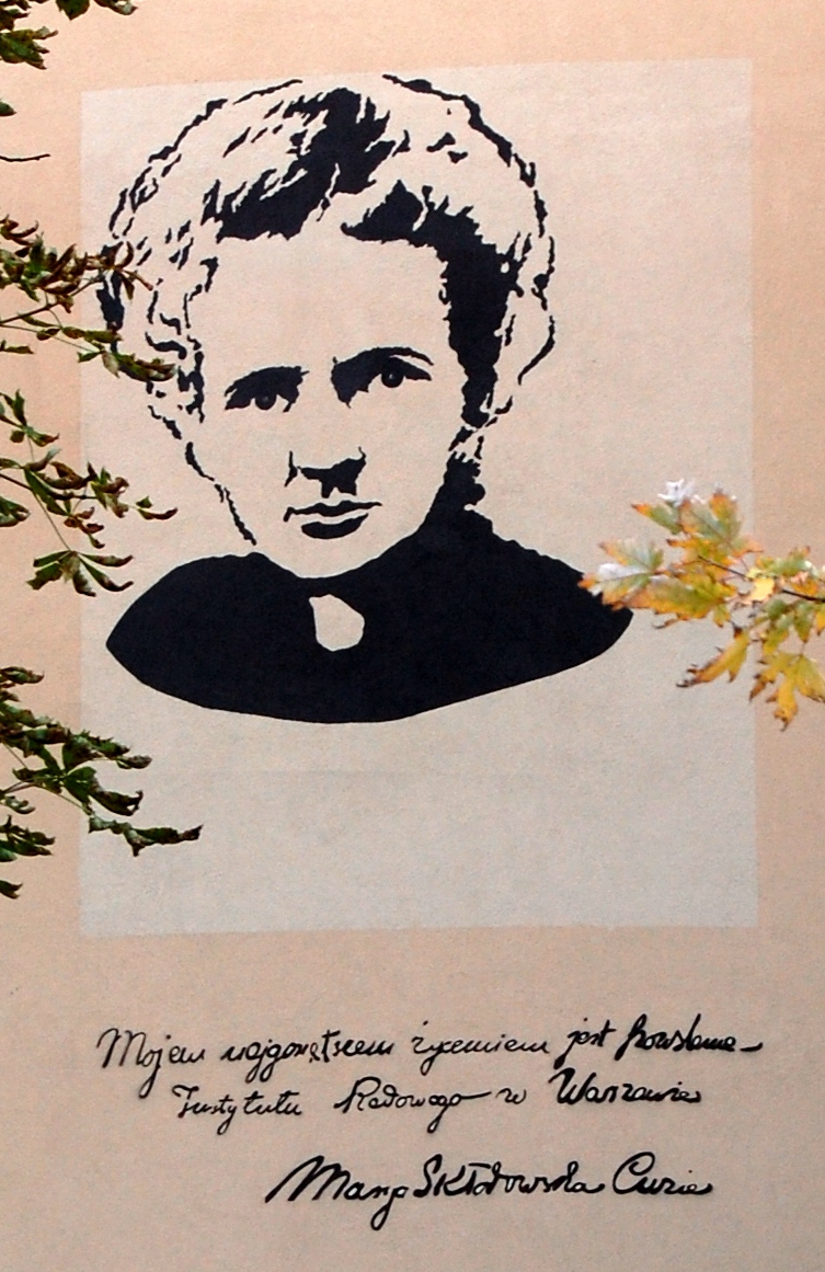 Mural na dawnym budynku Instytutu Radowego przy ulicy Wawelskiej w Warszawie.